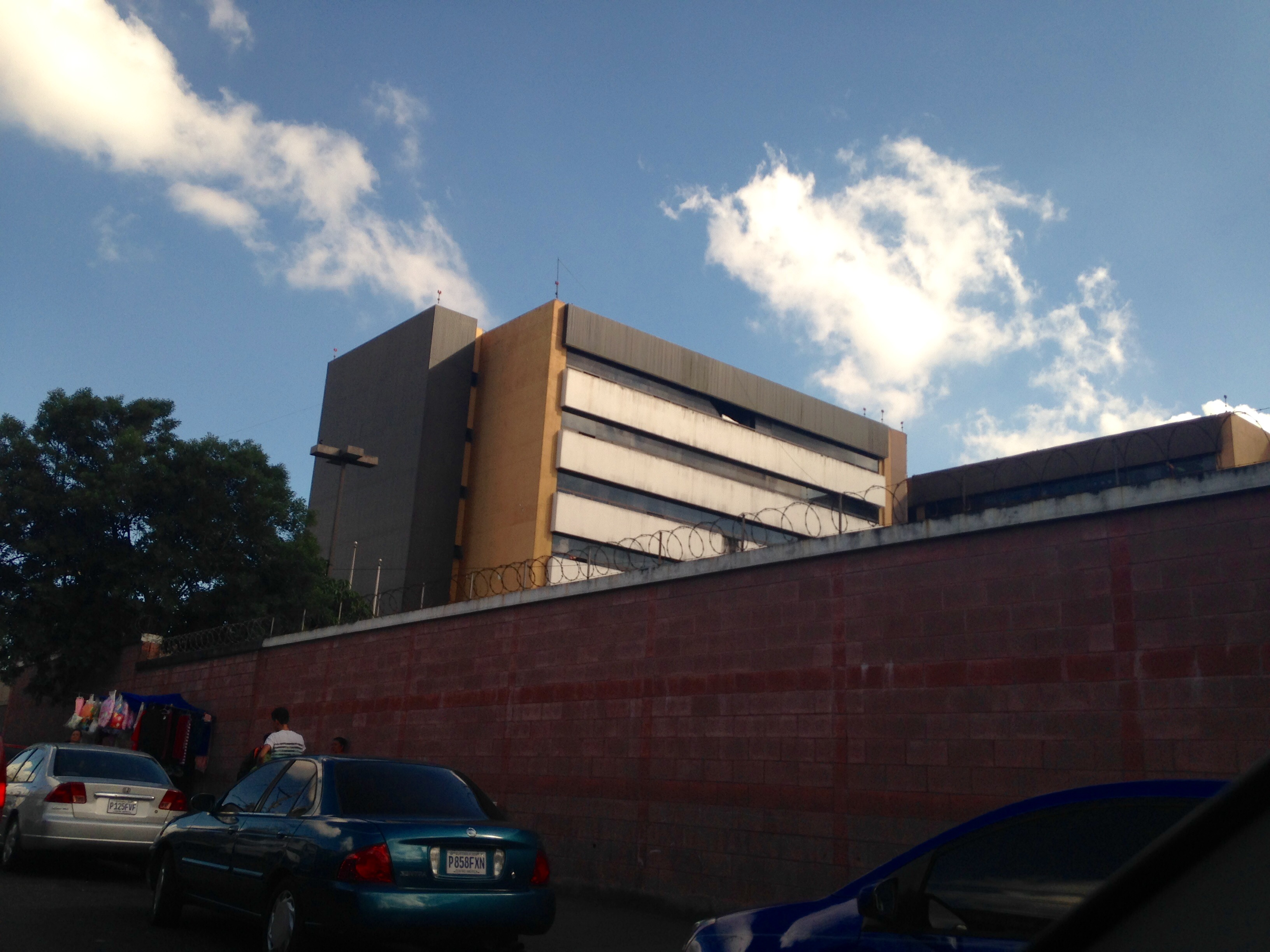 Hospital General San Juan de Dios, ciudad de Guatemala.